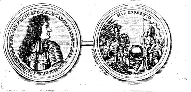 Gedenkmünze Georg Adolf Freiherr von Micrander, Brandenburg, 1691 Die Umschrift ist: GEORG ius ADOLPH us LIB er B aro DE MICRANDER SER enissimi EL ectoris BRAND enburgici GEN eralis EXCVP iarum PR EF ectus ET VRB is FRANC ofurtensis GVB ernator Übersetzung:Georg Adolph Freiherr von Micrander des durchlauchtigsten Kurfürsten zu Brandenburg General und Gouverneur zu Frankfurt an der Oder Auf der Rückseite: der Kriegsgott Mars mit Regimentsstab und Micranderischem Wappenschild, dazu zahlreiche Kriegsutensilien. Links stehen due Göttin Pallas Athene, mit wissenschaftlichen Gegenständen wie Globus, Bücher etc.